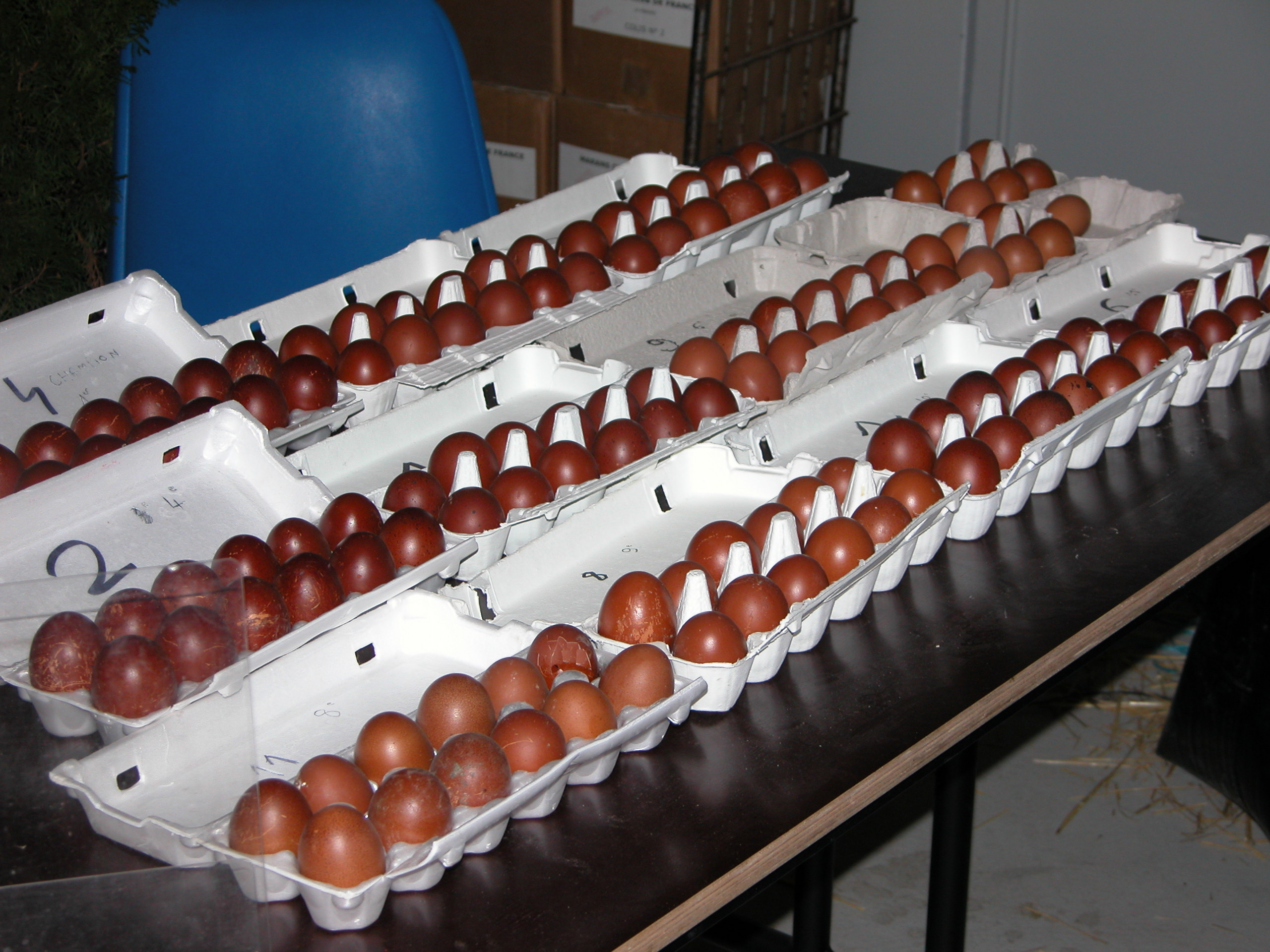 Champ de France oeufs Aurillac 2003